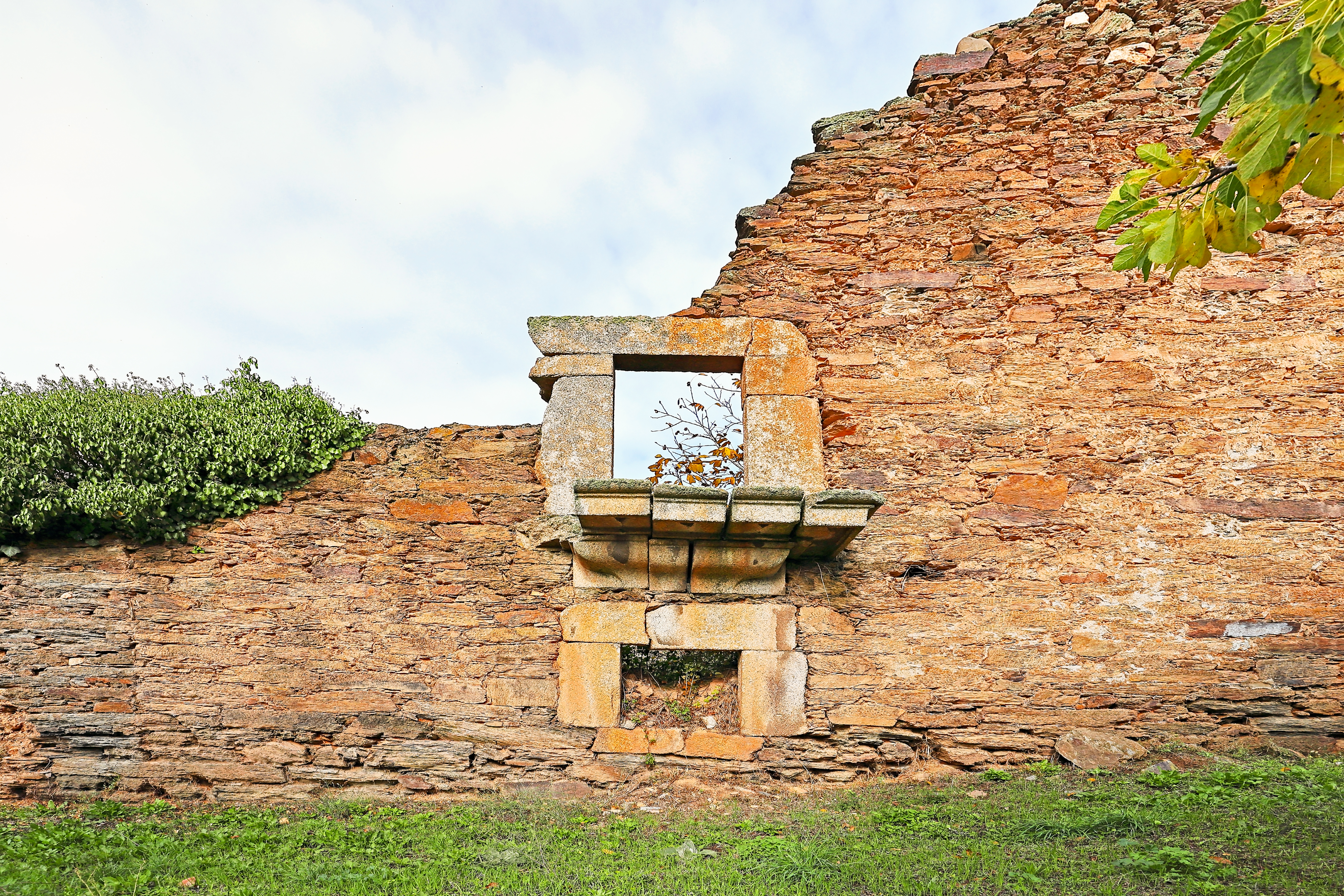 Cobrana es una localidad perteneciente al municipio de Congosto, comarca de El Bierzo, provincia de León.